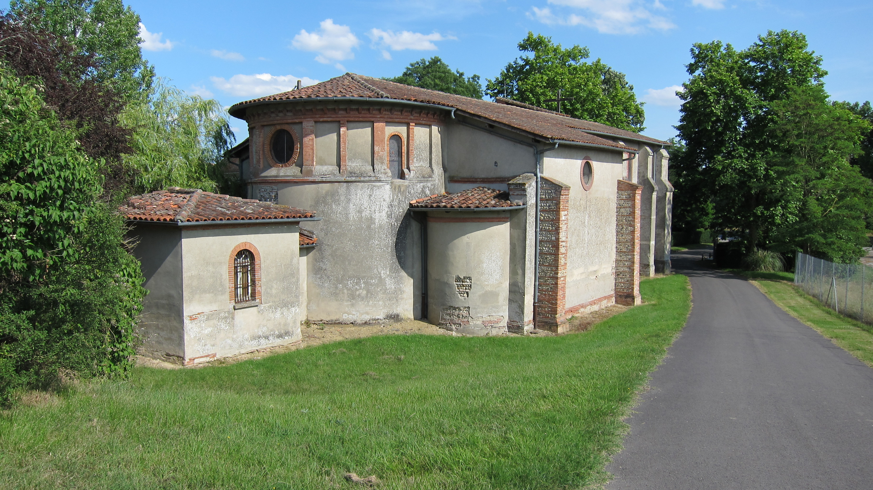 Beaupuy (Haute-Garonne, Midi-Pyrénées, France) : L'église.